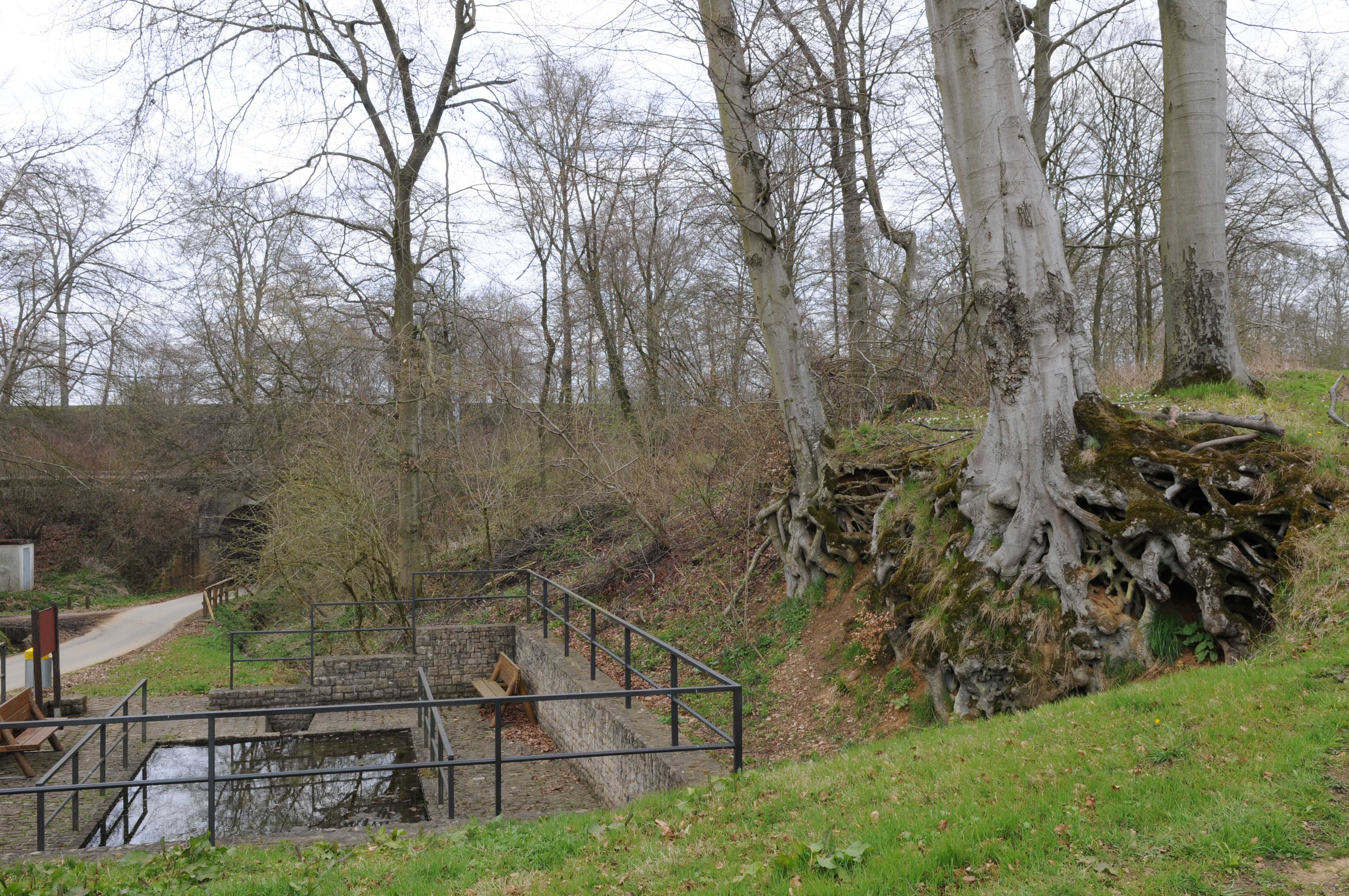 Kéibuer zu Hesper.